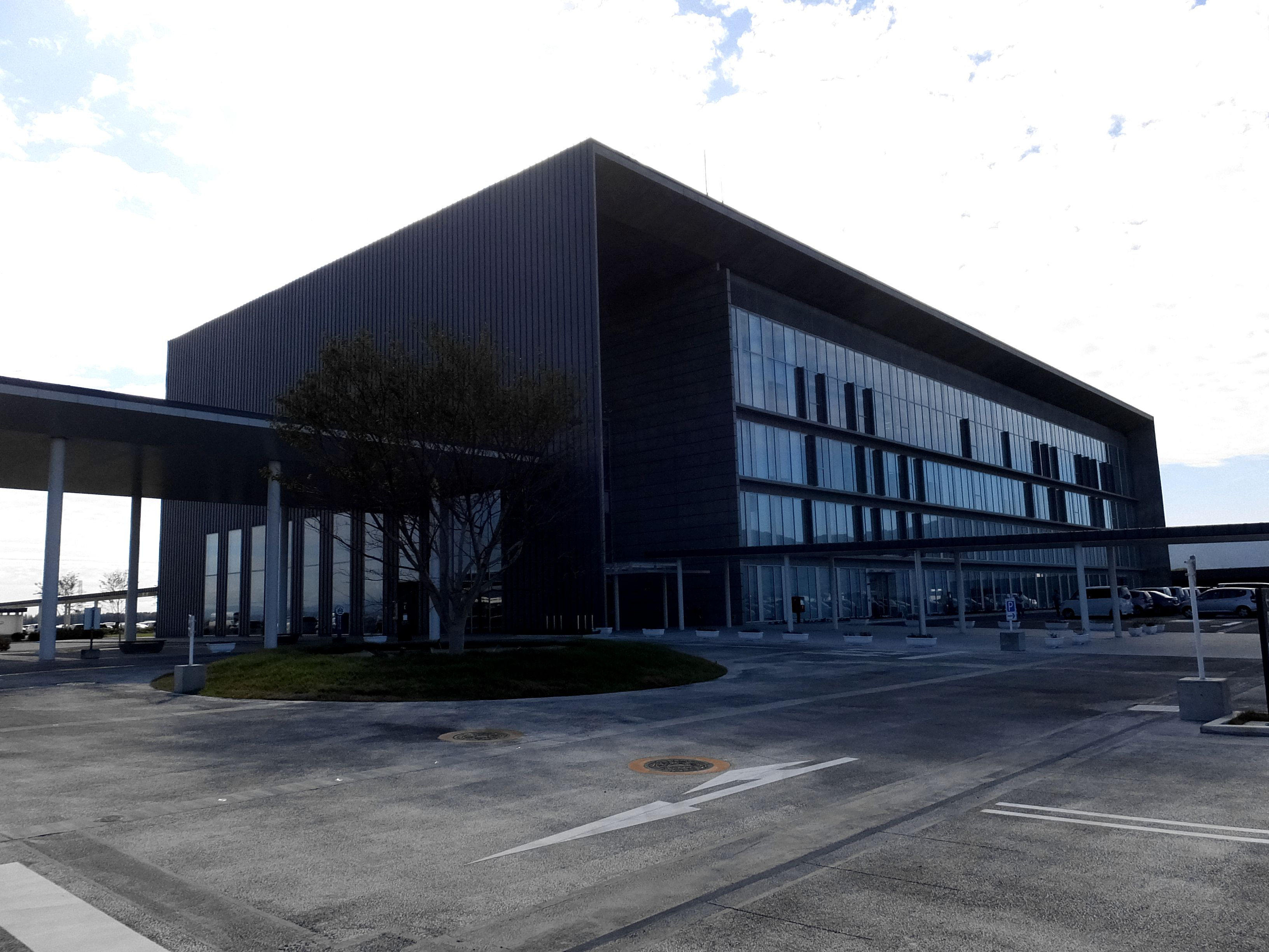 新潟県燕市役所